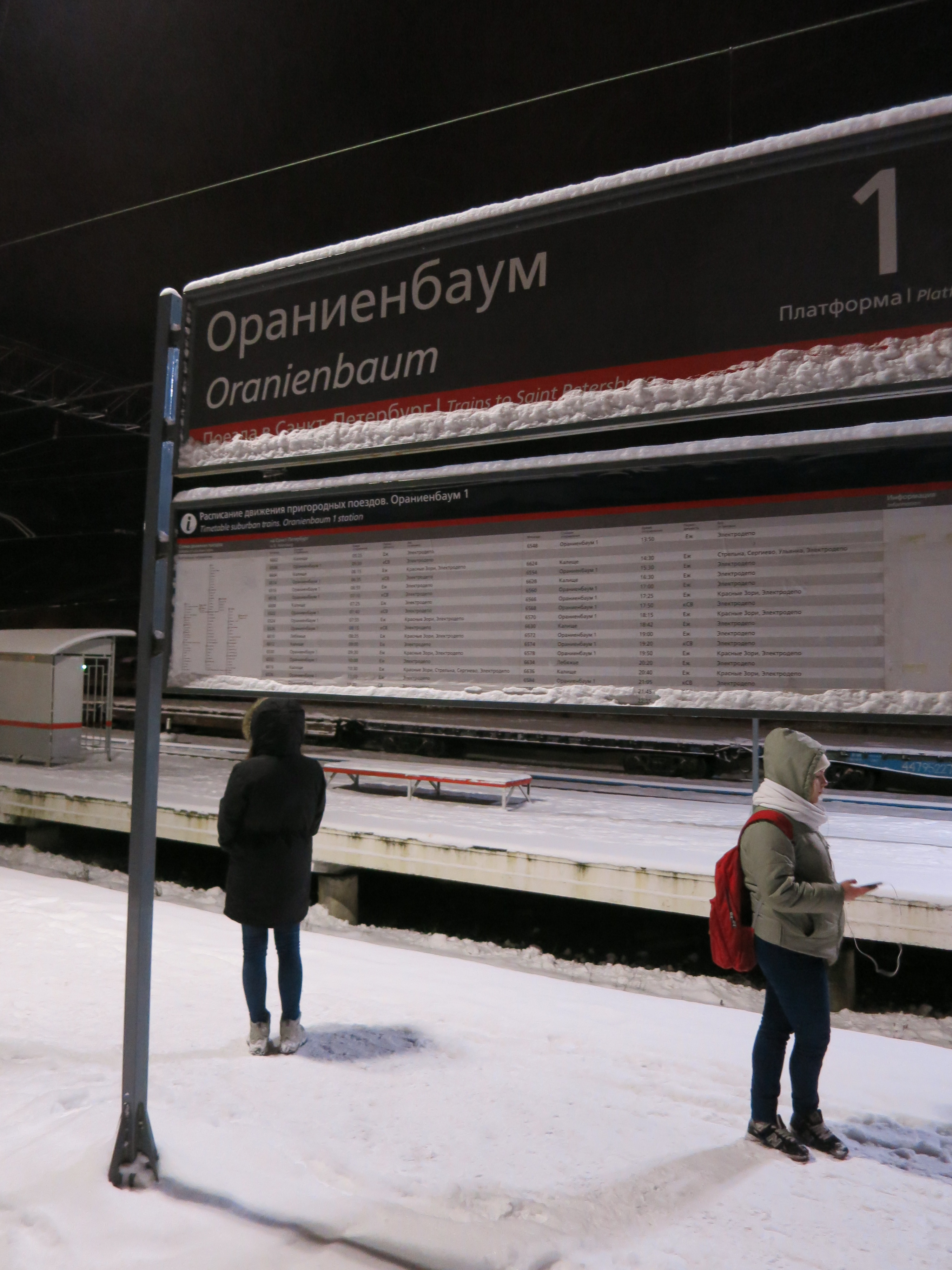 2017 год, декабрь